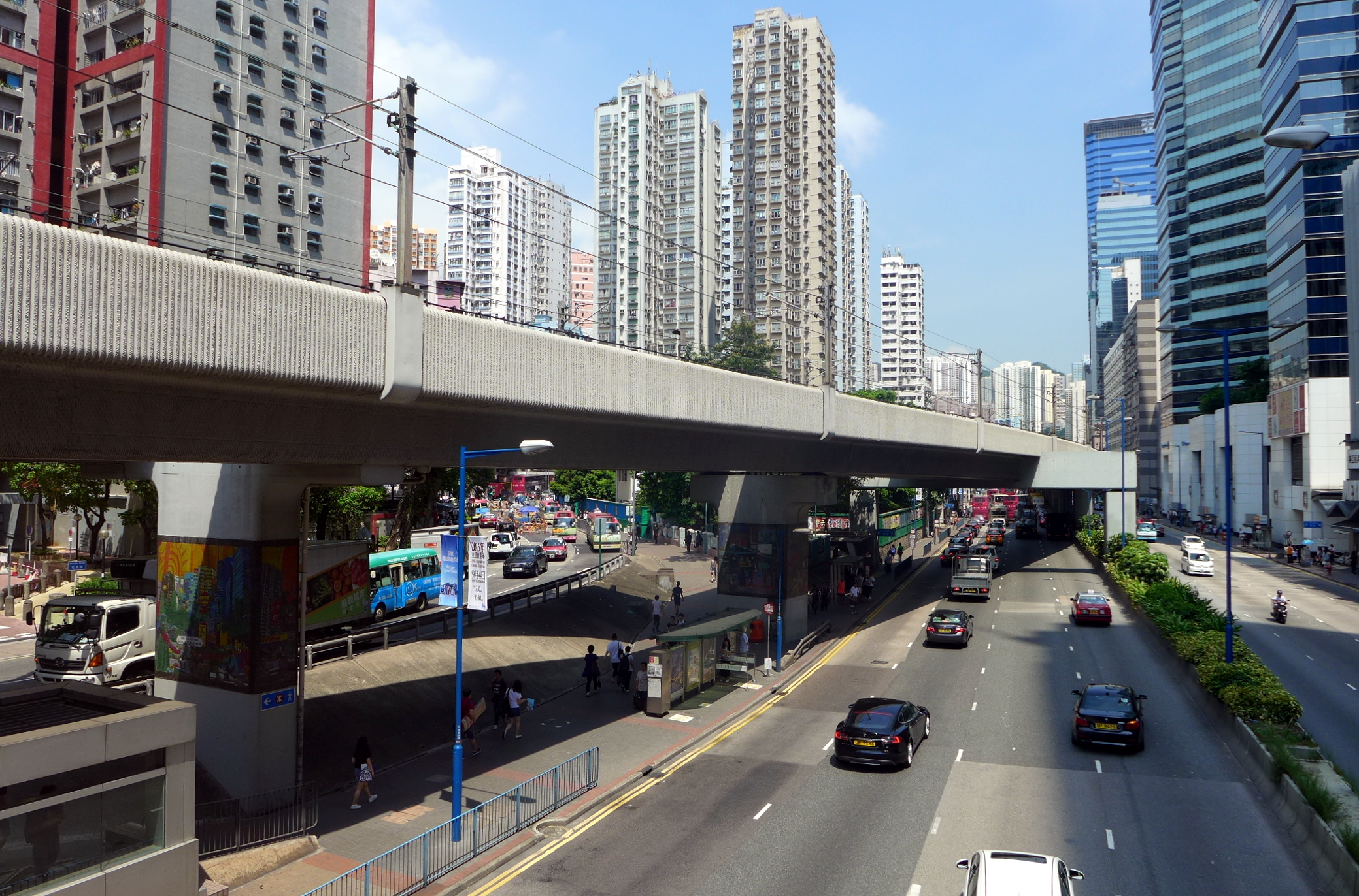 Kwun Tong Road